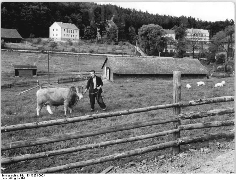 Clausberg, Bullenstall des VEG Zentralbild Wittig Be-L Aus Herrensitz wurde landwirtschafts-wissenschaftliches Institut Aus dem ehemaligen Herrensitz Clausberb bei Eisenach wurde nach der Bodenreform ein volkseigenes Gut für Tierzucht. 1952 übernahm die Deutsche Akademie der landwirtschaftswissenschaften zu Berlin das Gut und richtete dort eine Zweitstelle des Instituts für Tierzuchtforschung Dummersdorf bei Rostock ein. Zum Institut gehören 165 ha landwirtschafliche Nutzfläche. Dr. Bartsch, der Leiter des Instituts hat in langjähriger Arbeit dort eine wissenschaftliche Forschungsstelle geschaffen, die bereits Weltruf besitzt. Zu seinen verschiedenen Forschungsaufträgen gehören Kreuzungsversuche der einfarbig gelben Höhenviehrasse (Frankenrind) mit dem roten Dänen-Rind, die jedoch noch nicht abgeschlossen sind. "Wir sind unserer Regierung für die großzügige Unterstützung, die sie uns für die Erfüllung unserer Forschungsaufträge gibt, sehr dankbar", sagte Dr. Bartsch. "Wir können heute behaupten, daß wir uns mit unserer Züchtung auf der Höhe des internationelen Niveaus befinden. Wir werden unseren Dank bei der Wahl am 23.6.57 zum Ausdruck bringen." UBz: Viel hat sich seit der Übernahme von Clausberg durch die Akademie der Landwirtschaftswissenschaften Berlin verändert: Im Hintergrund links sehen wir einen Freiluftstall, zwei neue Wohnhäuser für die Angestellten des Instituts und die Arbeiter des angegliederten Landwirtschaftsbetriebes, rechts zwei Silos, Bild Mitte: der Bullenstall.